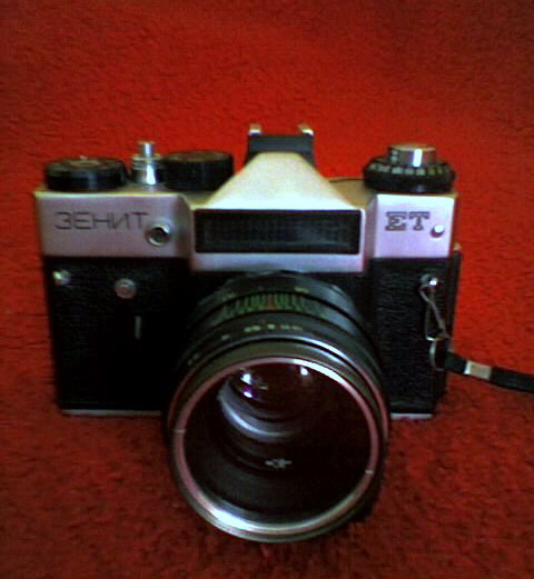 Aparat Zenit ET; obiectiv Helios 2/58; luminometru; timp de expunere de la B la 1/500s